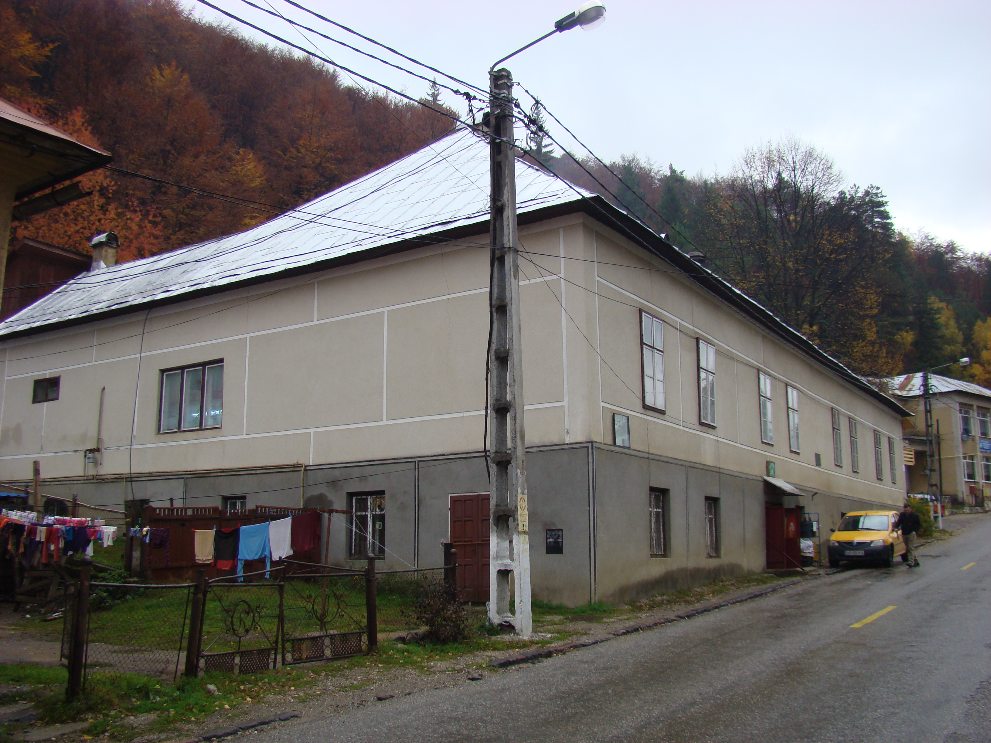 Ansamblul de locuințe și administrația minei Cavnic (Cartier Handal), Str. Eliberării 39, 41, 43, 45